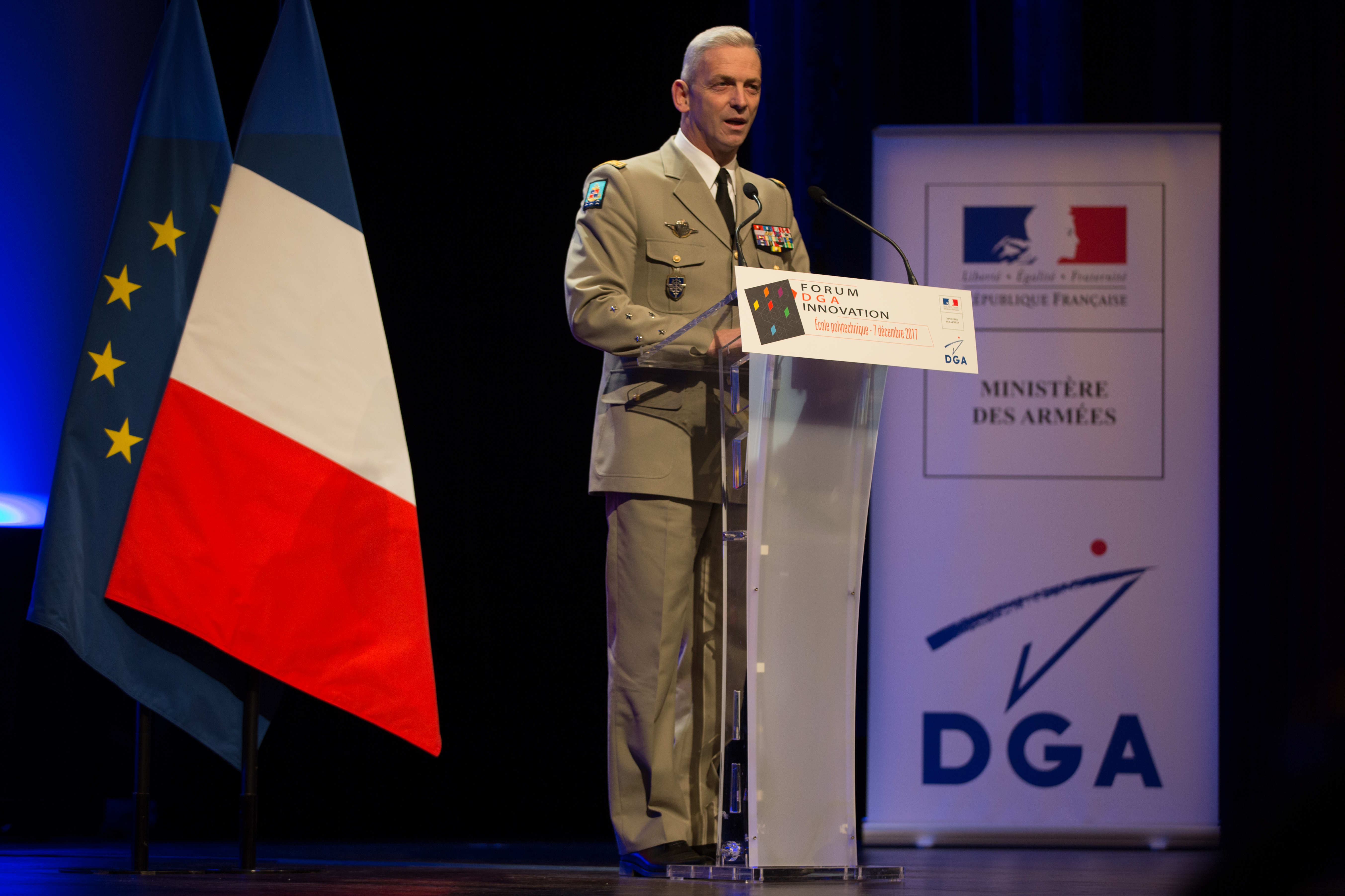 Visite du Général d'armée François Lecointre, chef d'État-Major des armées (CEMA) à l'Ecole polytechnique à l'occasion du Forum 2017 de la DGA